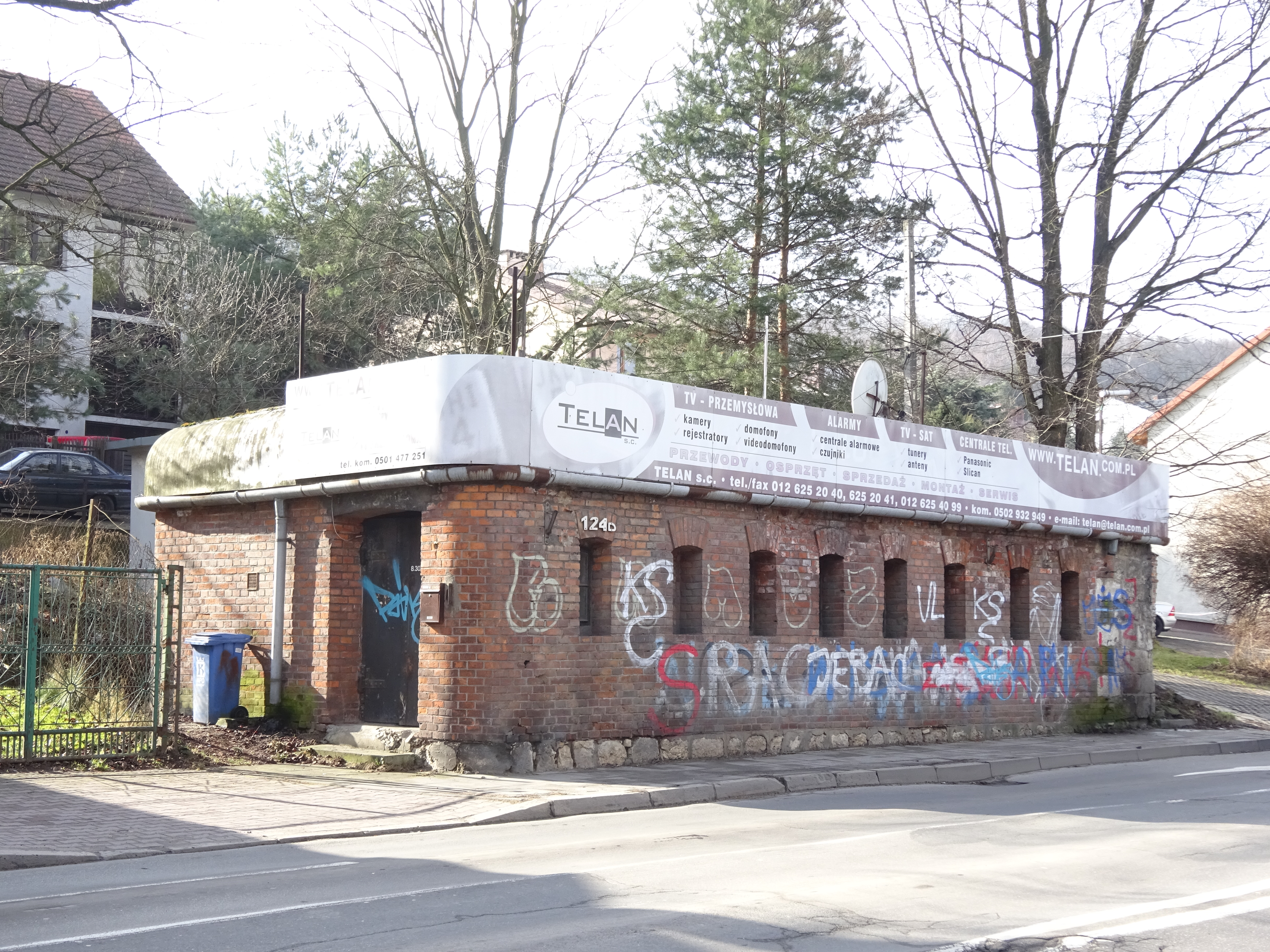 Ostróg bramny "Wola Justowska" Fortu cytadelowego 2 'Kościuszko" w Krakowie przy ul. Królowej Jadwigi 124. 2016